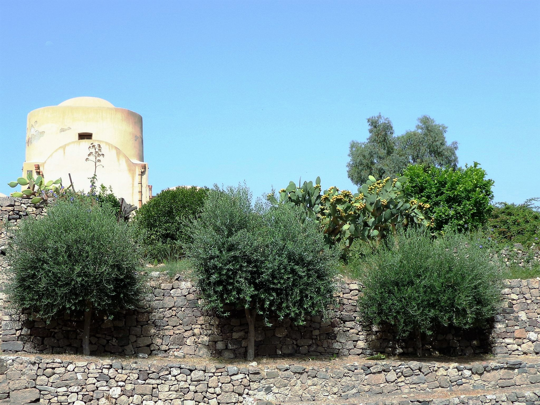 Chiesa della Madonna Addolorata. Foto presente su pagine web personali e sul profilo FB.